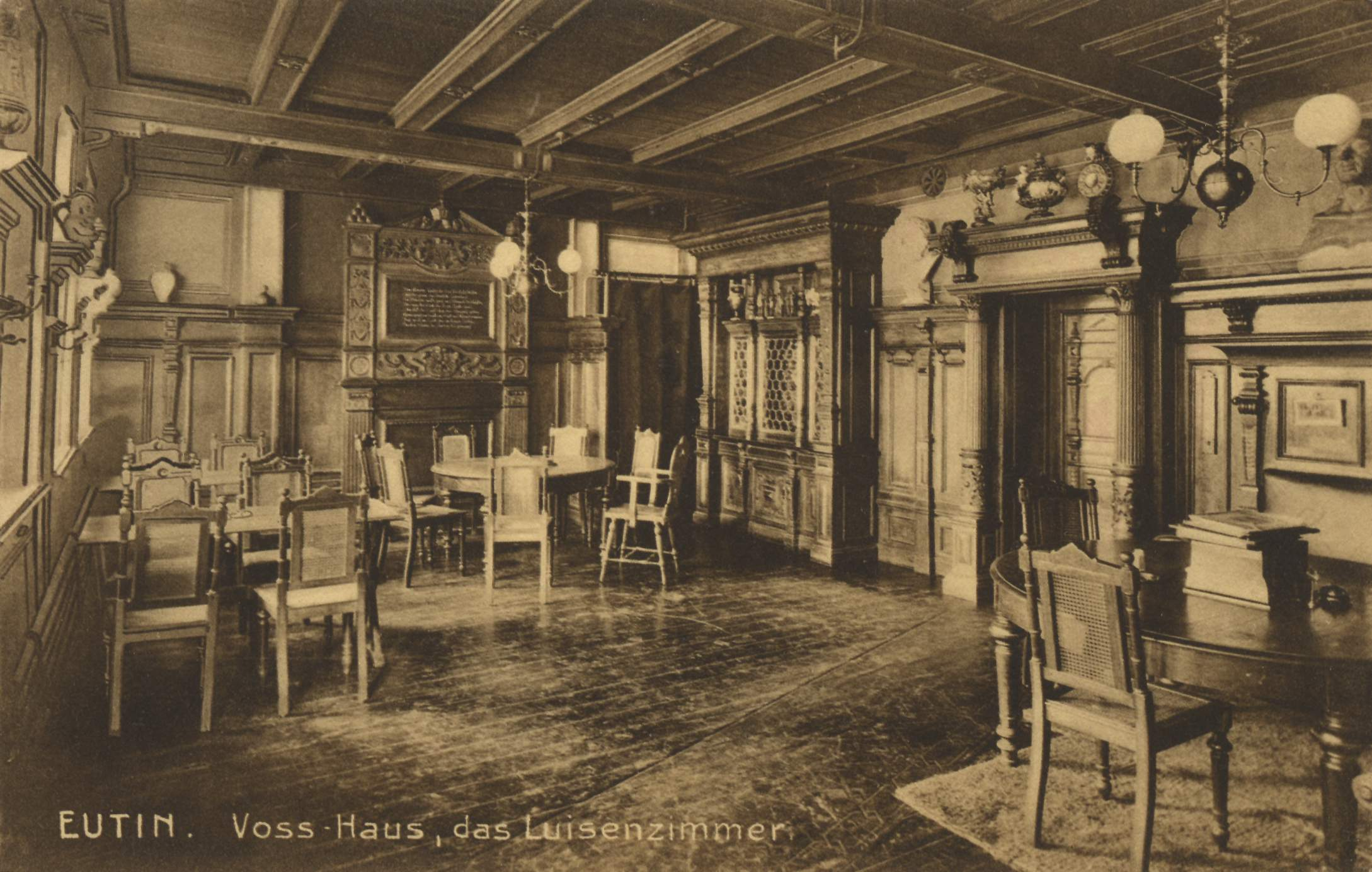 Vosshaus, Luisenzimmer